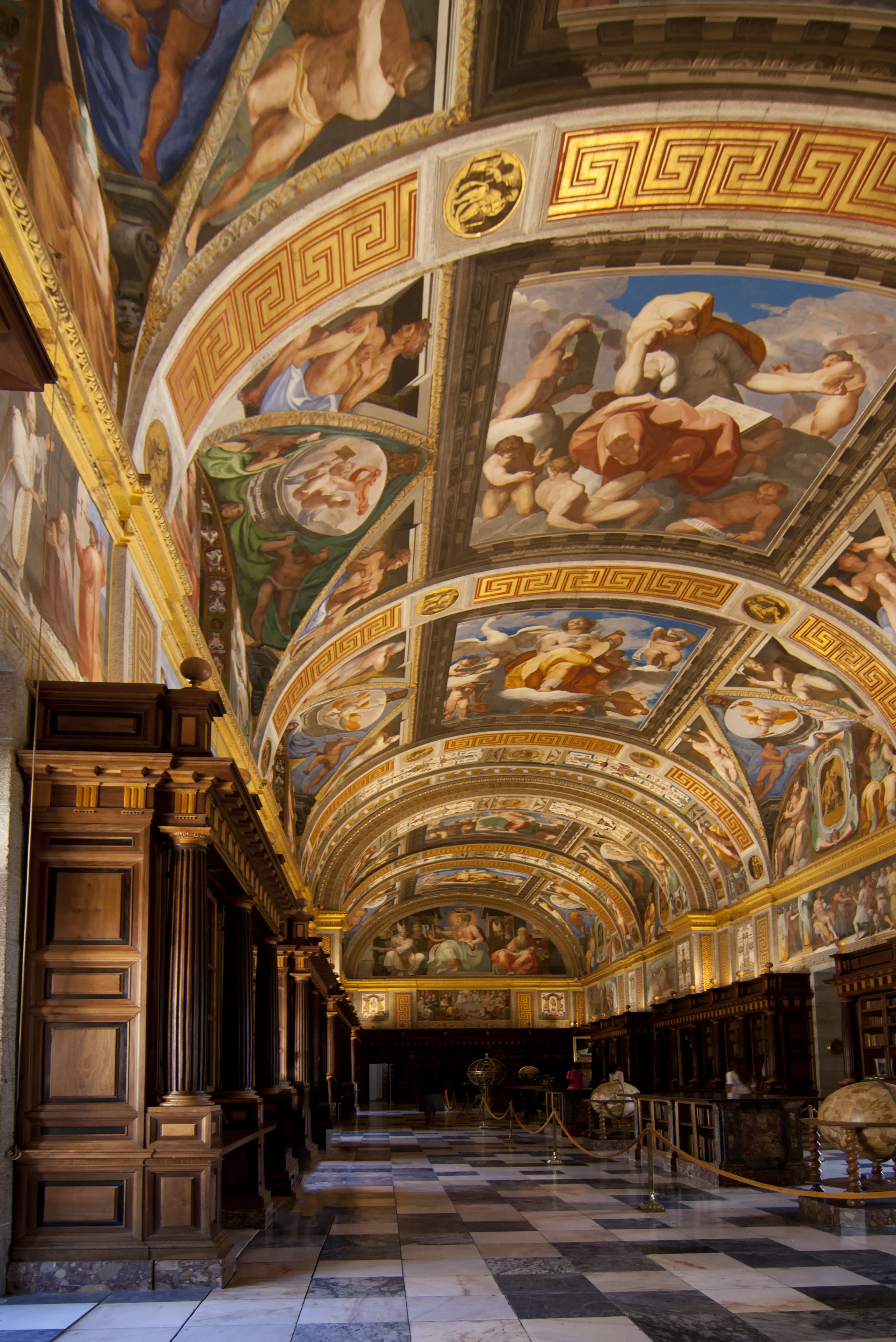 La Biblioteca del interior del Monasterio de El Escorial (Madrid)